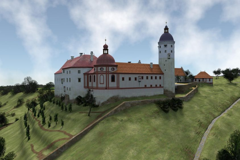 Zámek Zvířetice, 3D model – předpokládaná podoba v roce 1683.